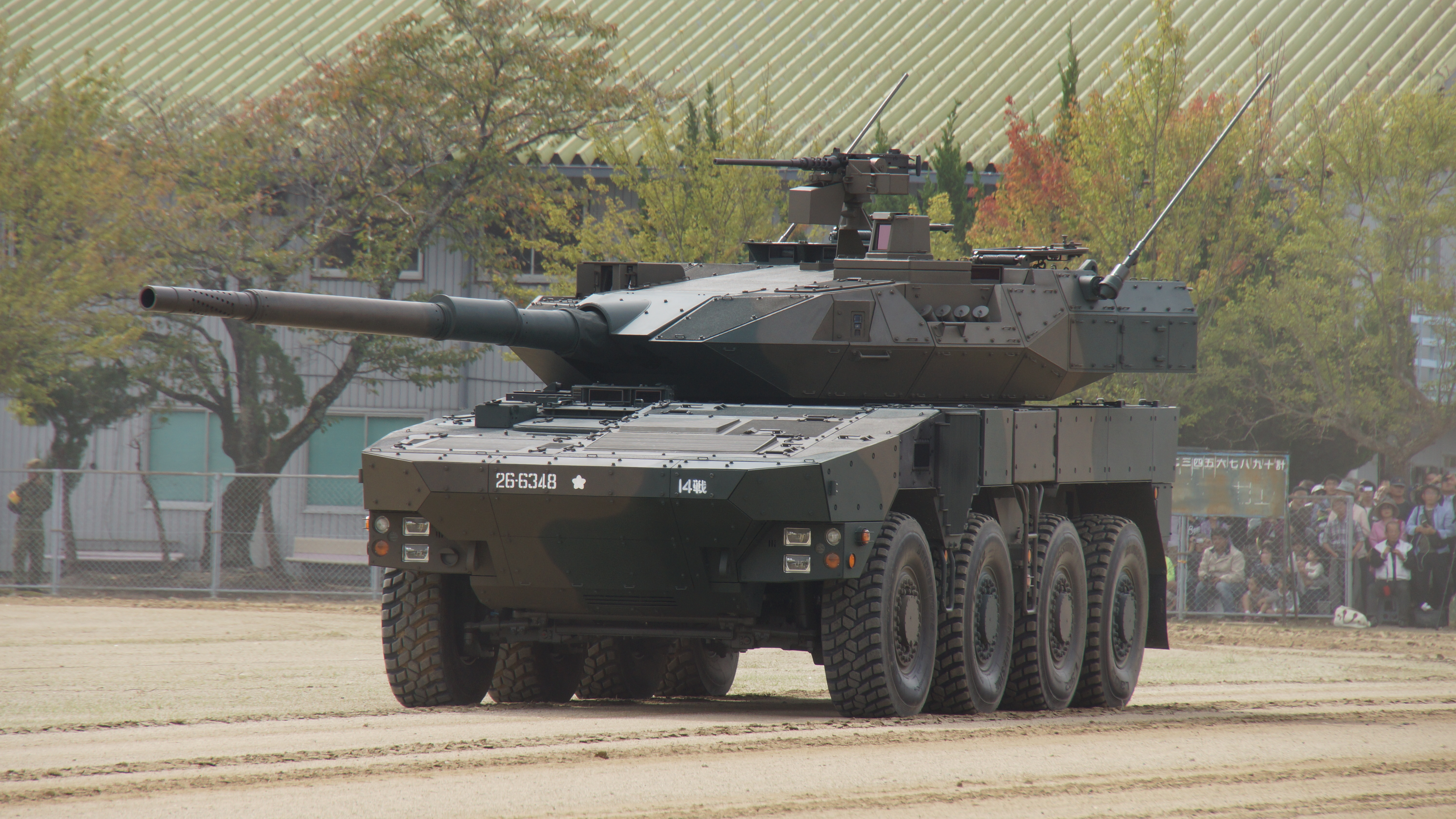 陸上自衛隊 16式機動戦闘車（26-6348号車） 左前部。2017年10月1日 日本原駐屯地にて。